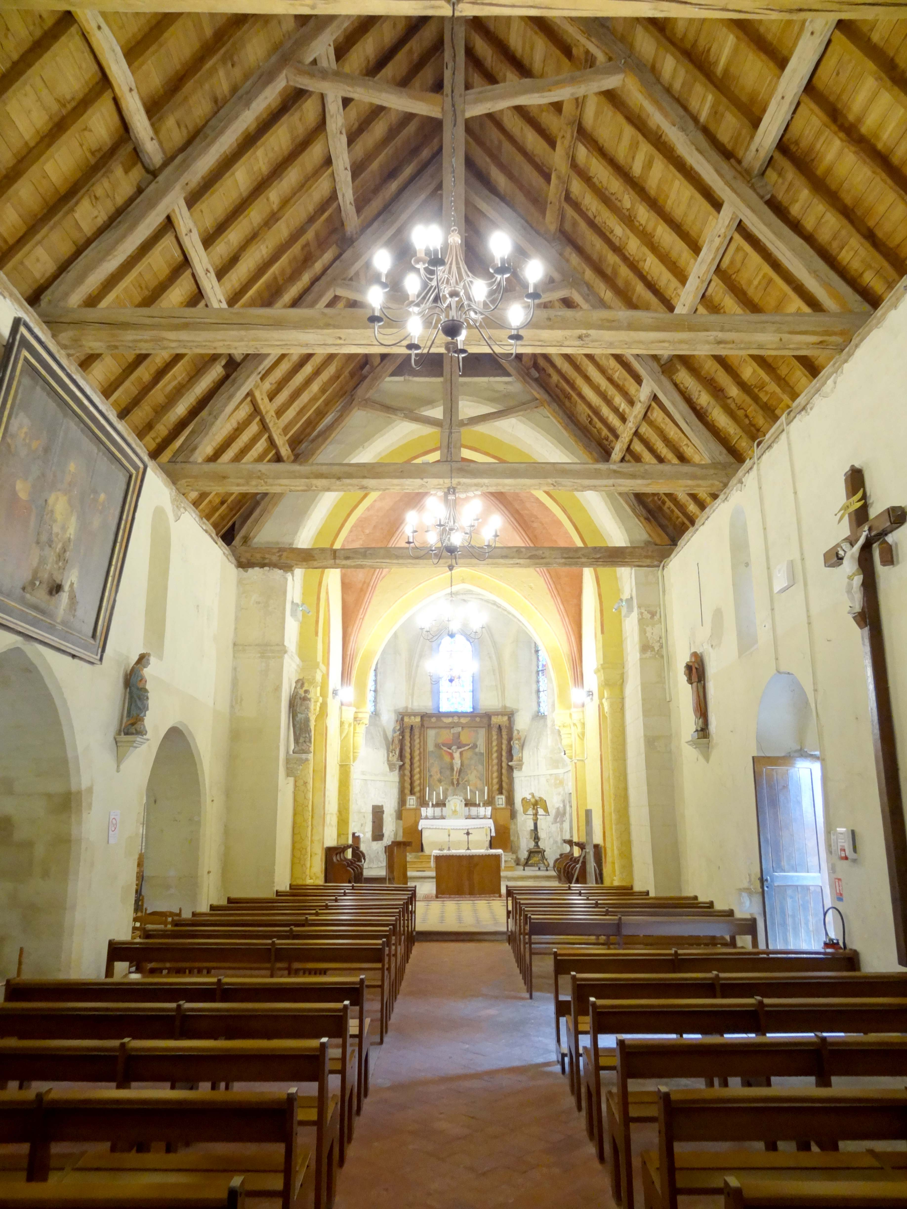 Intérieur de l'église - voir titre.